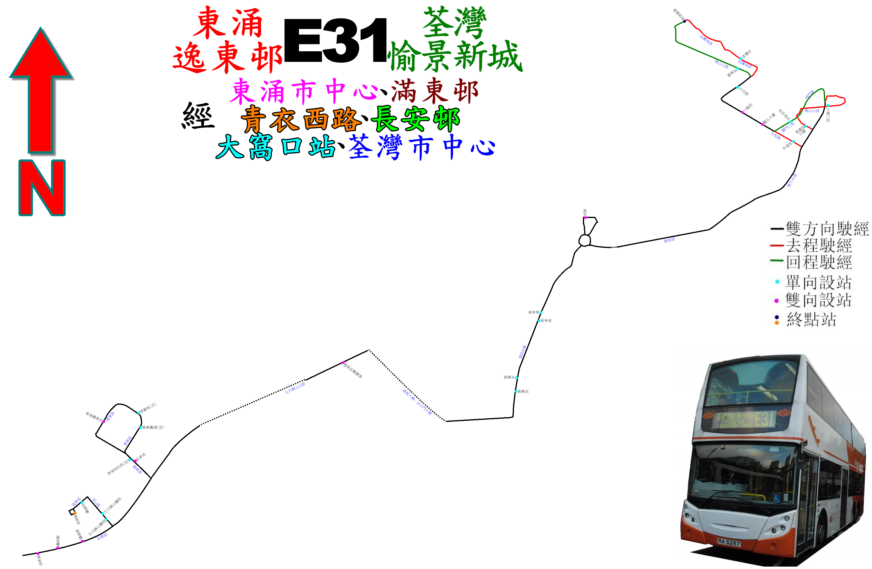 中文（香港）: 龍運巴士E31線的走線圖